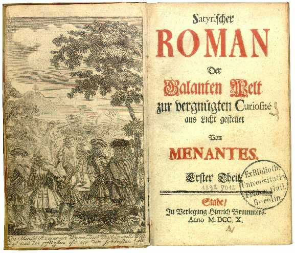 Hunold, Christian Friedrich (Menantes), Satyrischer Roman, 1-2 (Stade: H. Brummer, 1710). Satyrischer ROMAN Der Galanten Welt zur vergnügten Curiosité ans Licht gestellet Von MENANTES. Erster Theil. Stade. In Verlegung Hinrich Brummers. Anno M. DCC. X.